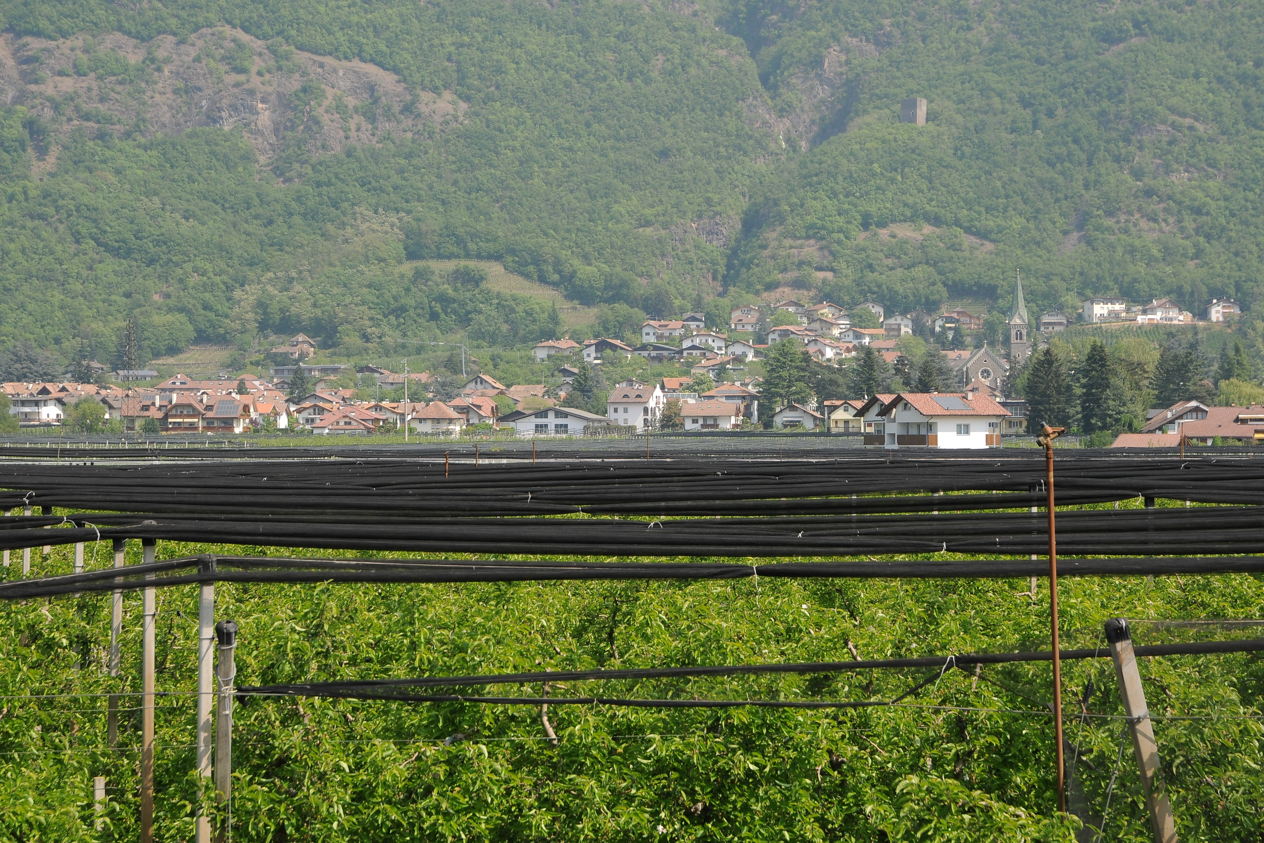 Gargazon gesehen vom Radweg an der Etsch.